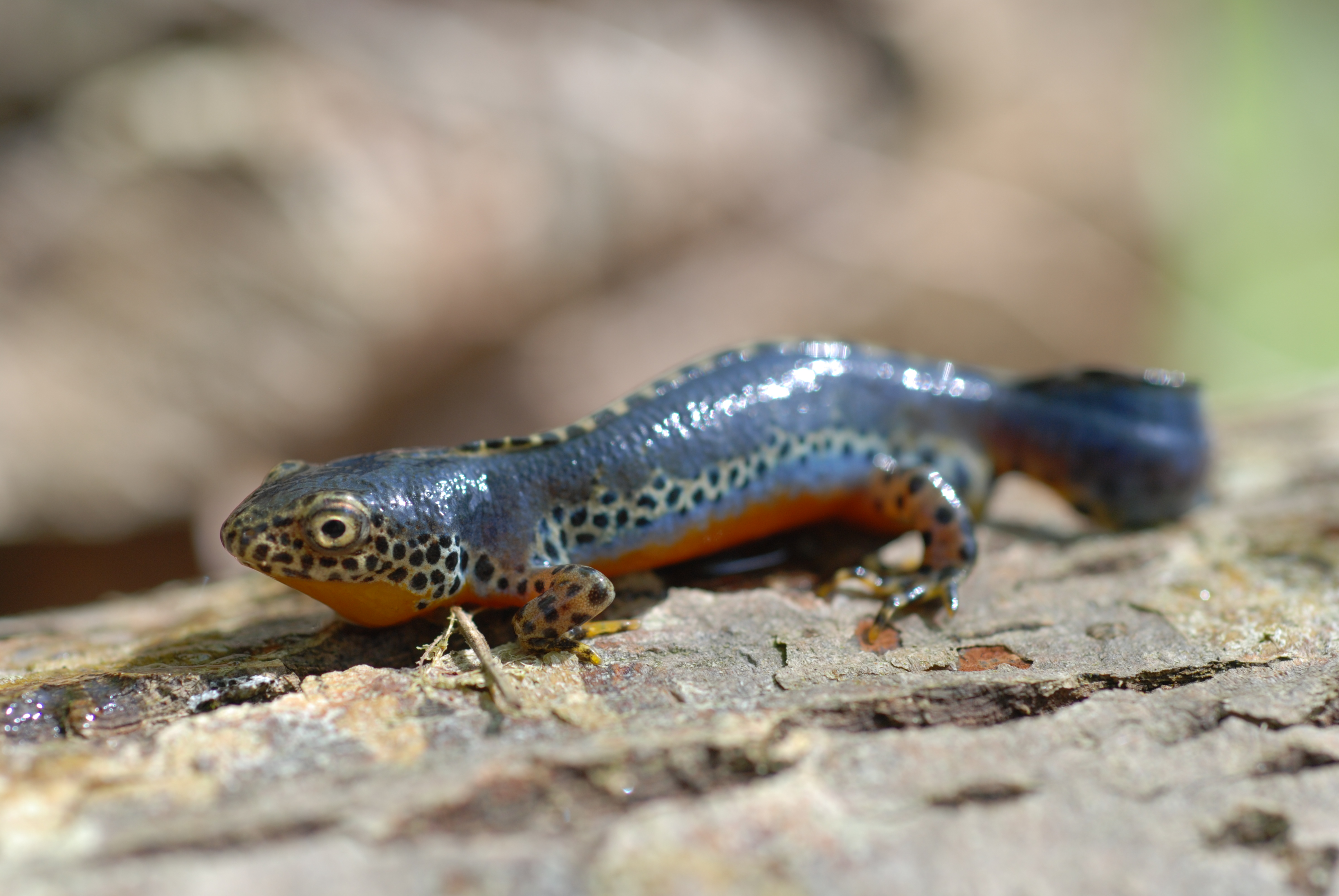 Triturus alpestris Location : Argonne, France